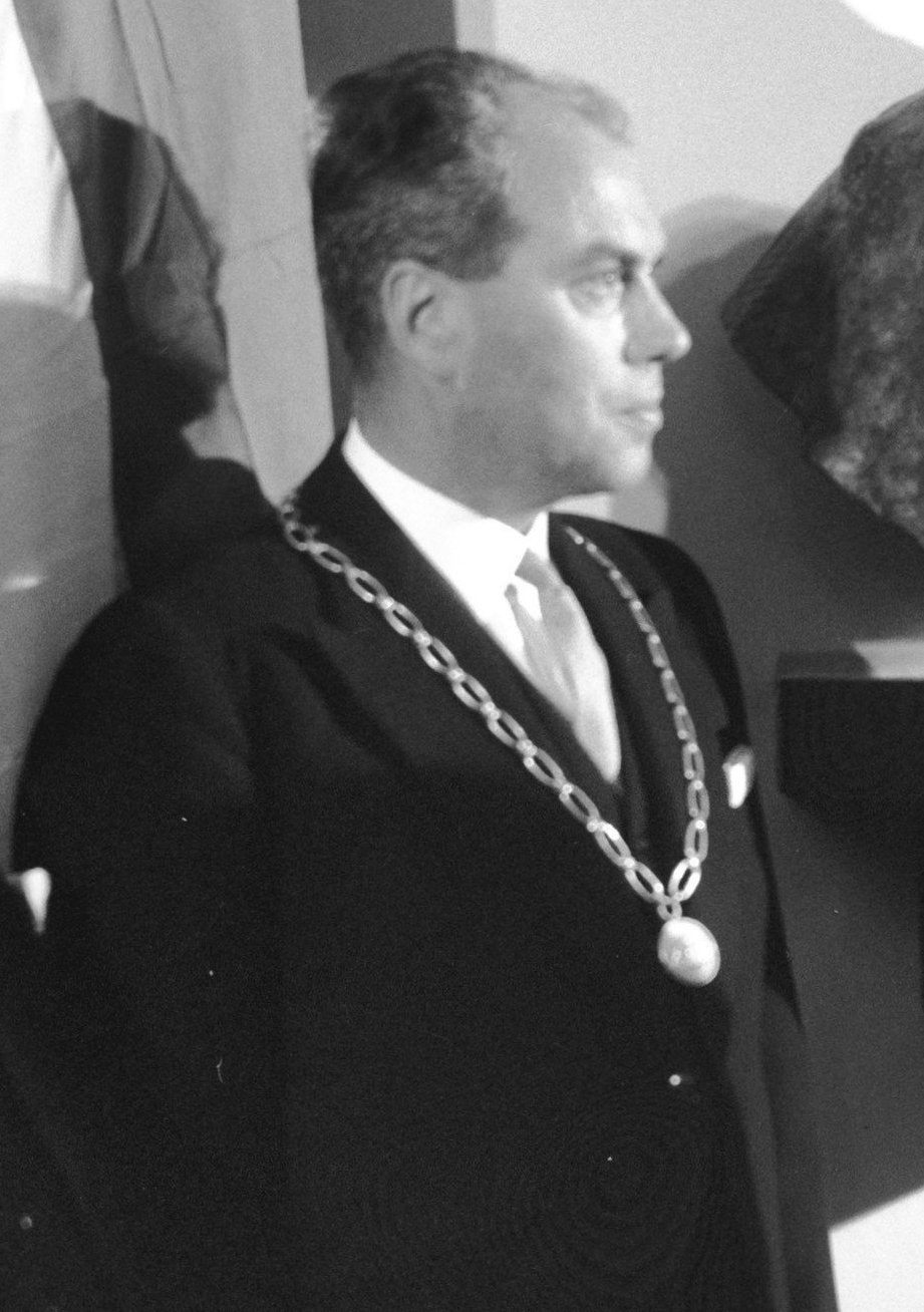 Collectie / Archief : Fotocollectie Anefo Reportage / Serie : Mr. H.W. Bloemers, Commissaris der Koningin in de provincie Gelderland, onthult een borstbeeld van koningin Wilhelmina in het gemeentehuis van Heerde Beschrijving : V.l.n.r. H.G.J.M. Drabbe, voorzitter van het comité van aanbieding, burgemeester Faber en H.W. Bloemers Datum : 28 april 1964 Locatie : Gelderland, Heerde Trefwoorden : beeldhouwwerken, burgemeesters, commissarissen van de koningin, gemeentehuizen, groepsportretten, koninginnen, onthullingen Persoonsnaam : Bloemers, H.W., Drabbe, H.G.J.M., Faber, Tj., Wilhelmina (koningin Nederland) Fotograaf : Bilsen, Joop van / Anefo, [onbekend] Auteursrechthebbende : Nationaal Archief Materiaalsoort : Negatief (zwart/wit) Nummer archiefinventaris : bekijk toegang 2.24.01.04 Bestanddeelnummer : 916-3607 Reacties Geplaatst door Cultuurmens op 16 februari 2017 - 17:21. Borstbeeld vervaardigd door beeldhouwer August Falise.